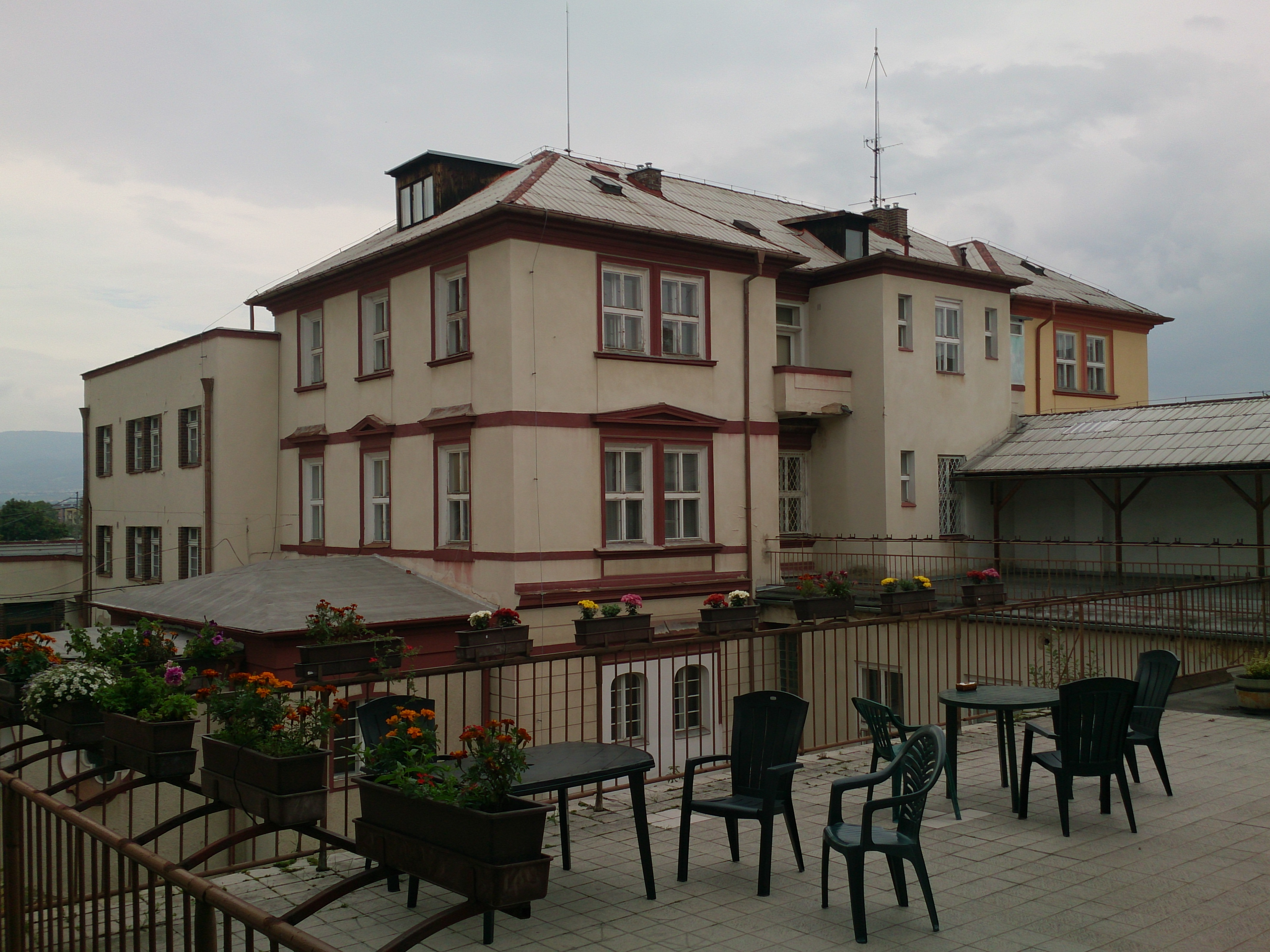 neurologické oddělení, ochoz.